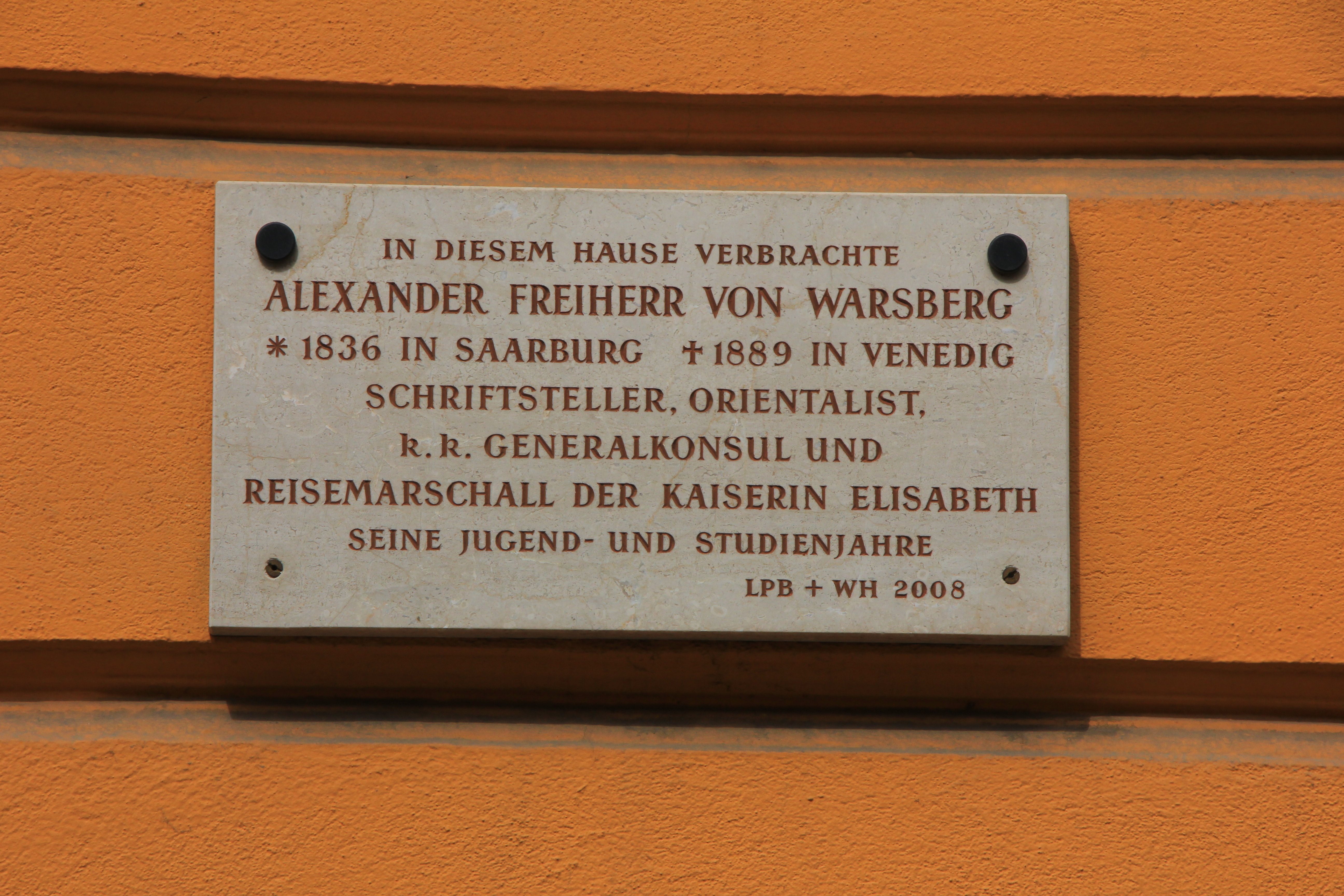 Gedenktafel am Haus in der Zinzendorfgasse in Graz, in dem der Freiherr Alexander von Warsberg lebte